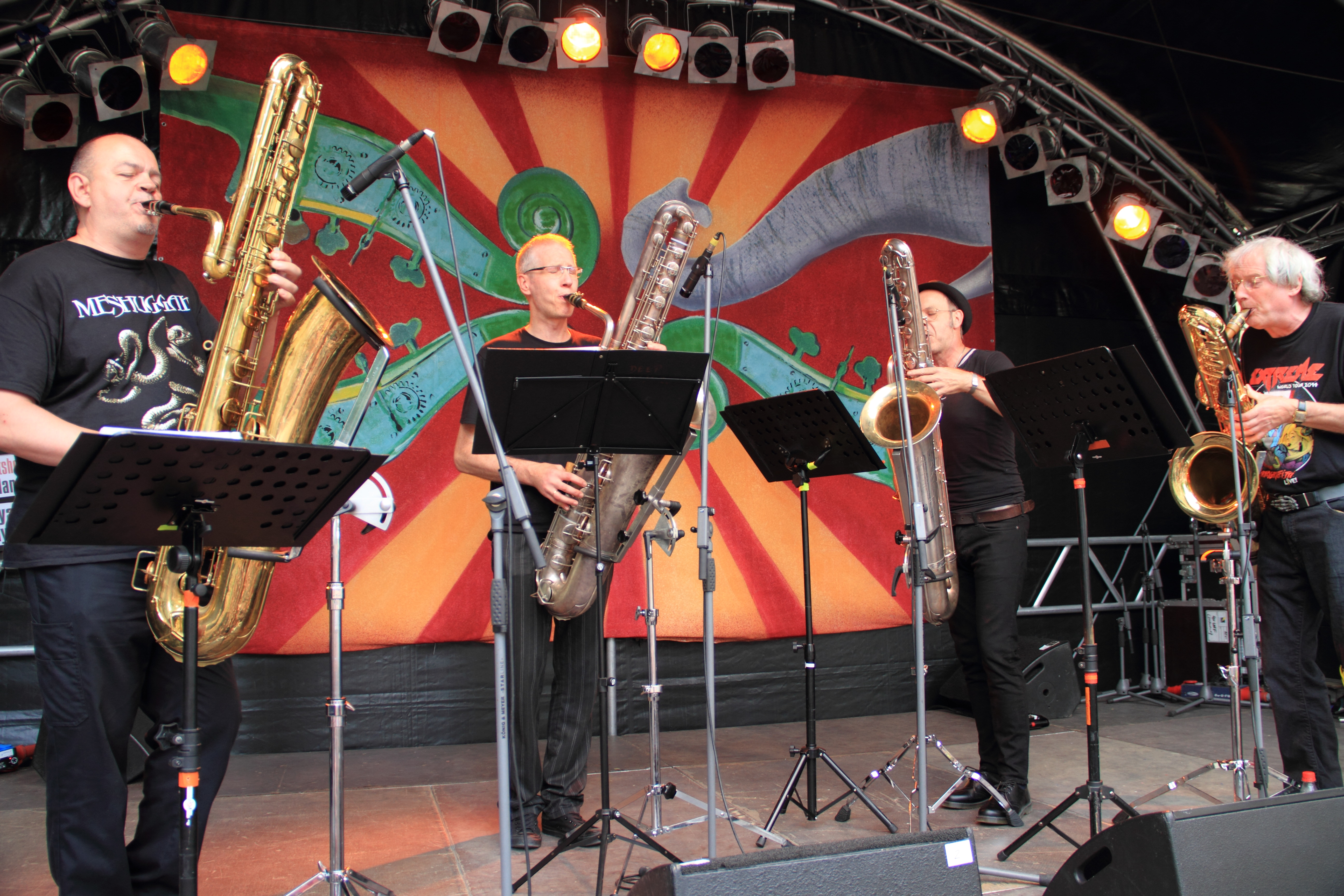 Das Basssaxophonquartett Deep Schrott auf dem TFF Rudolstadt 2014. v.l.n.r.: Dirk Raulf, Andreas Kalong, Jan Klare & Wollie Kaiser.